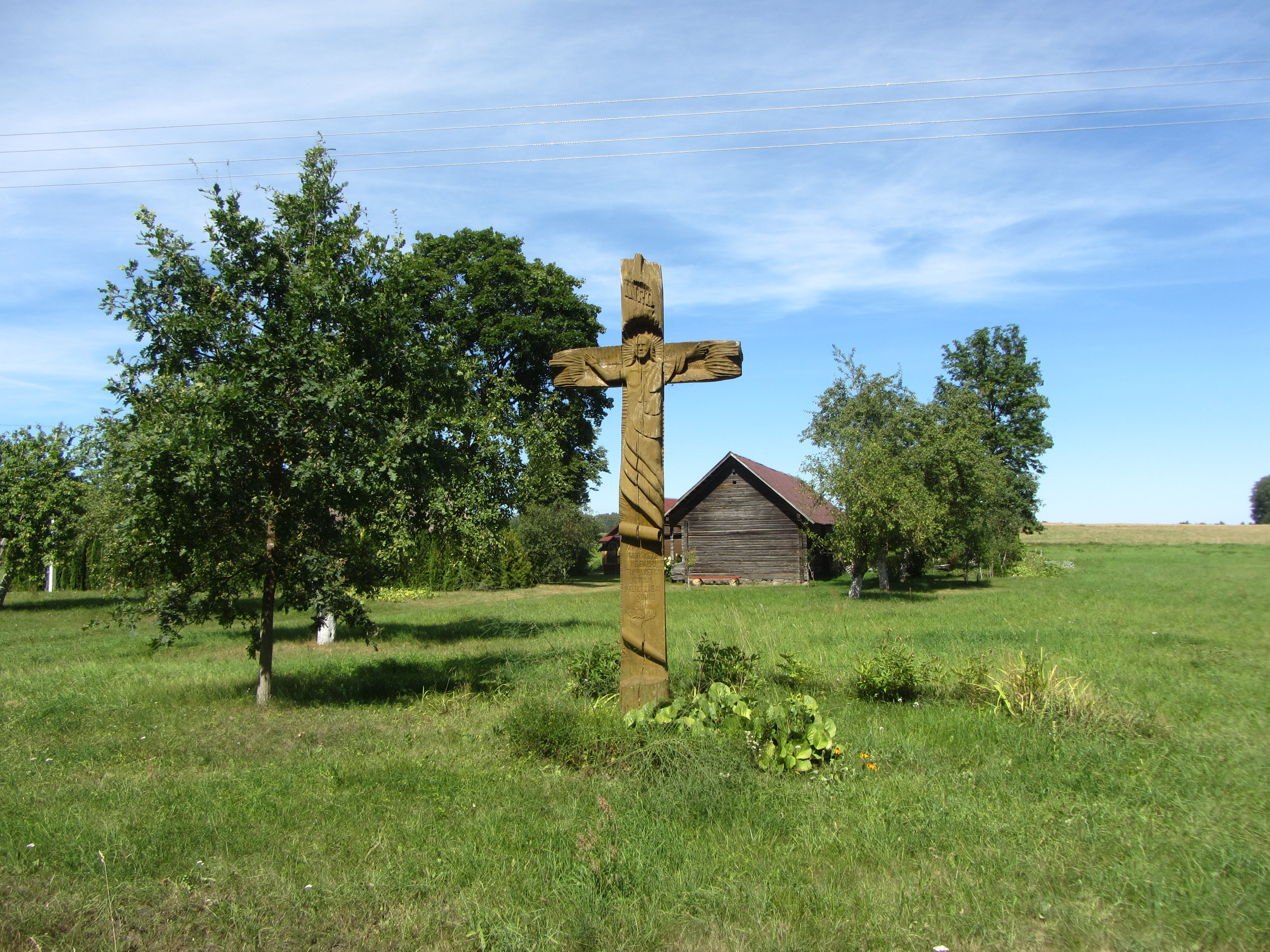 Užpalių sen., Lithuania